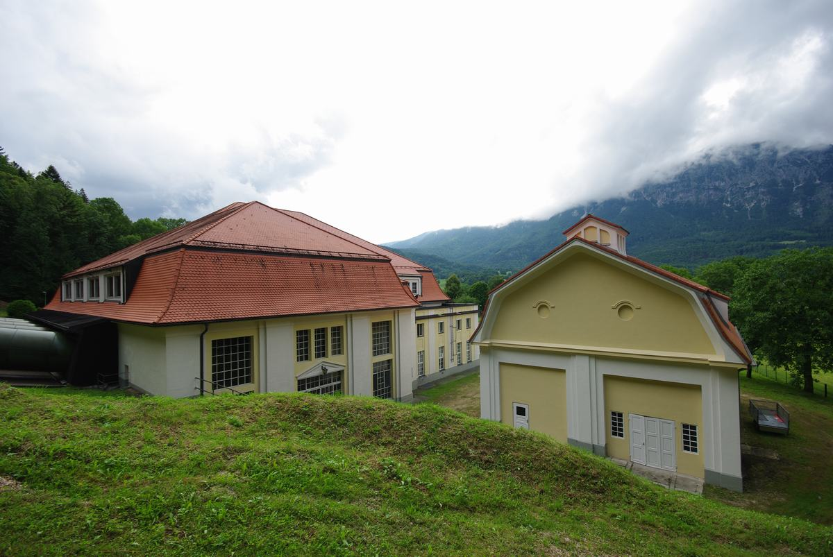 Saalachkraftwerk mit Nebengebäude. Bei dem Nebengebäude handelt es sich um das Transformatorenhaus II, das sog. Wackerhaus.